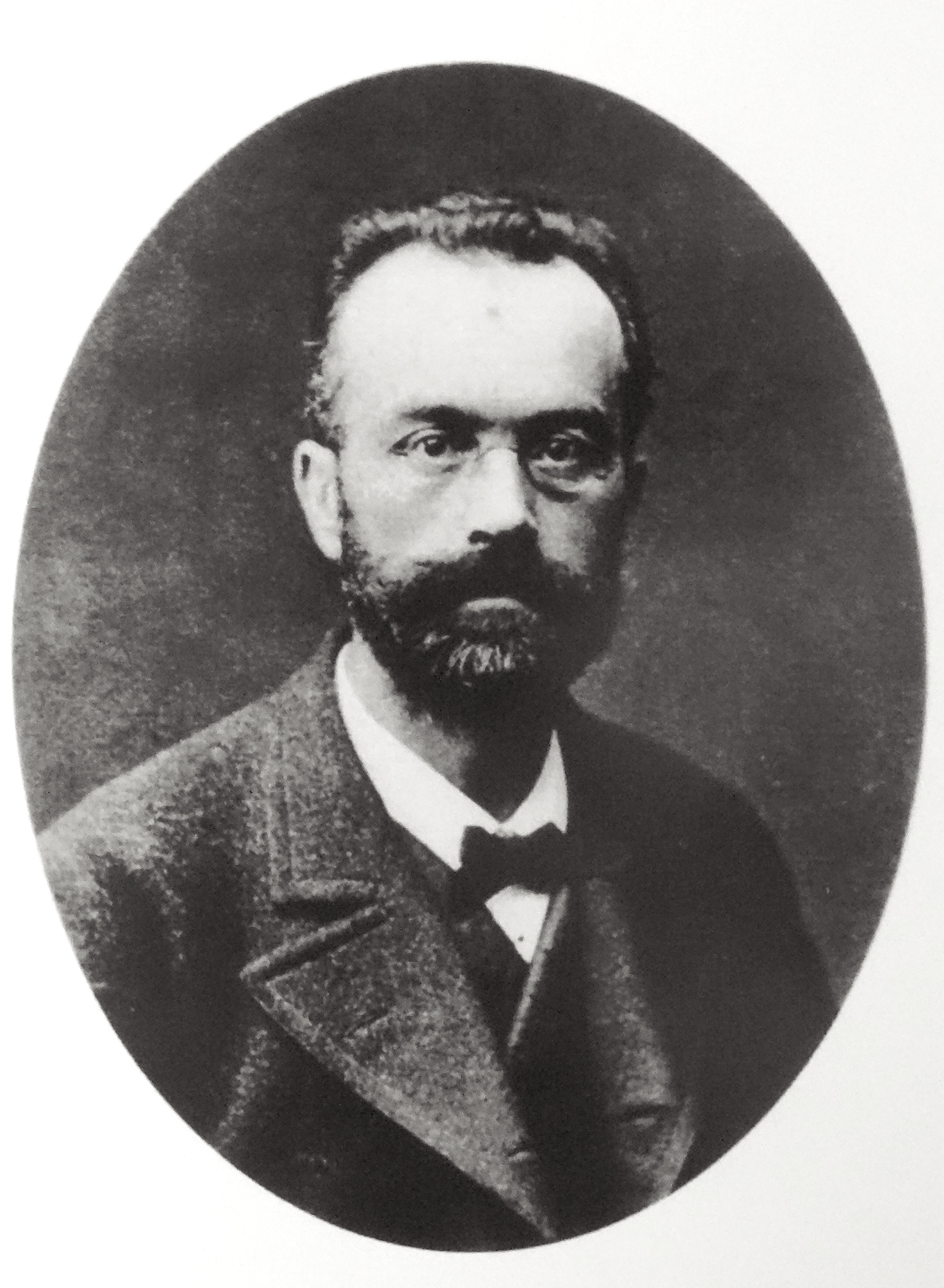 Gustav Huguenin